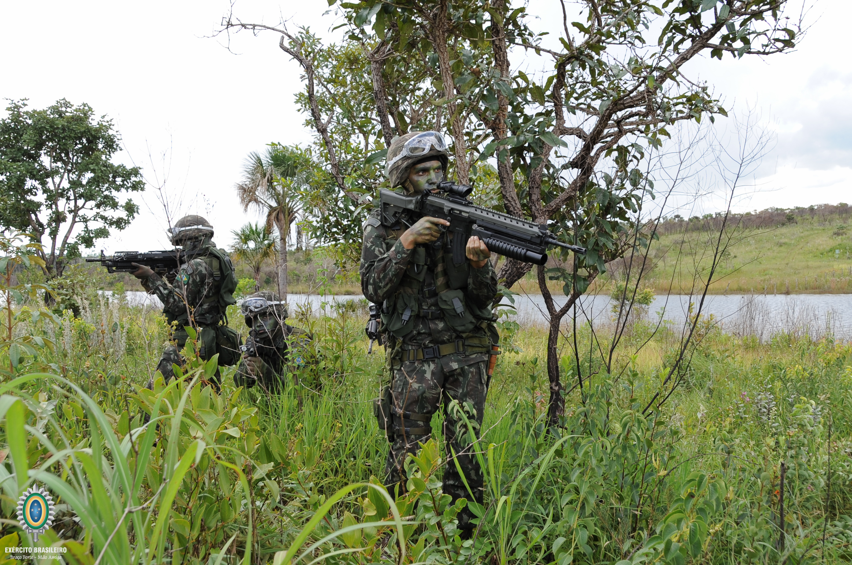 Comandos, Forças Especiais, combatente, Exército, Tiro instintivo caatinga, paraquedistas, atirador, sniper, mergulhadores